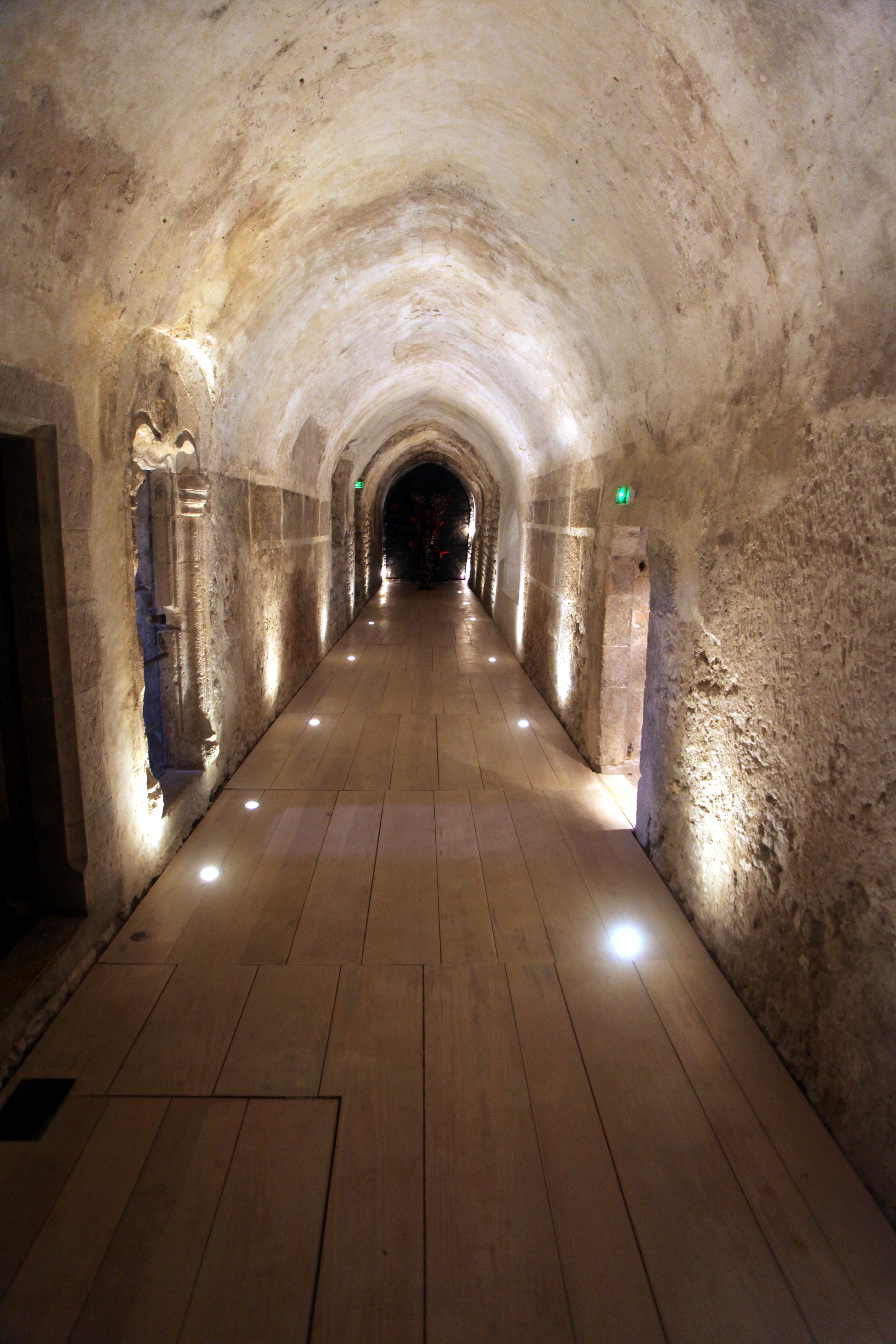 Grand cloître au musée de l'Abbaye à Saint-Claude (Jura).